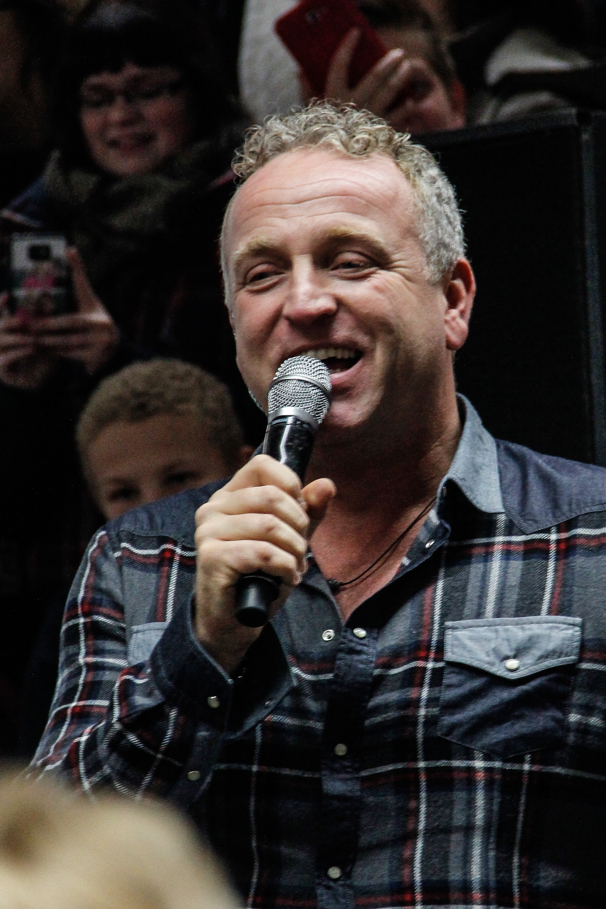 Gordon tijdens een instore optreden (2013)